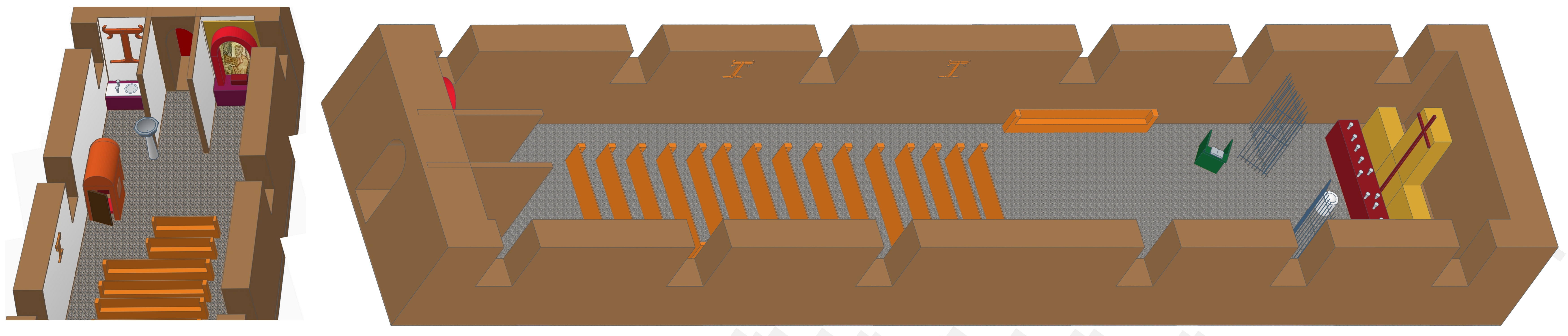 Dordrecht, Interieur Minderbroederskerk compleet